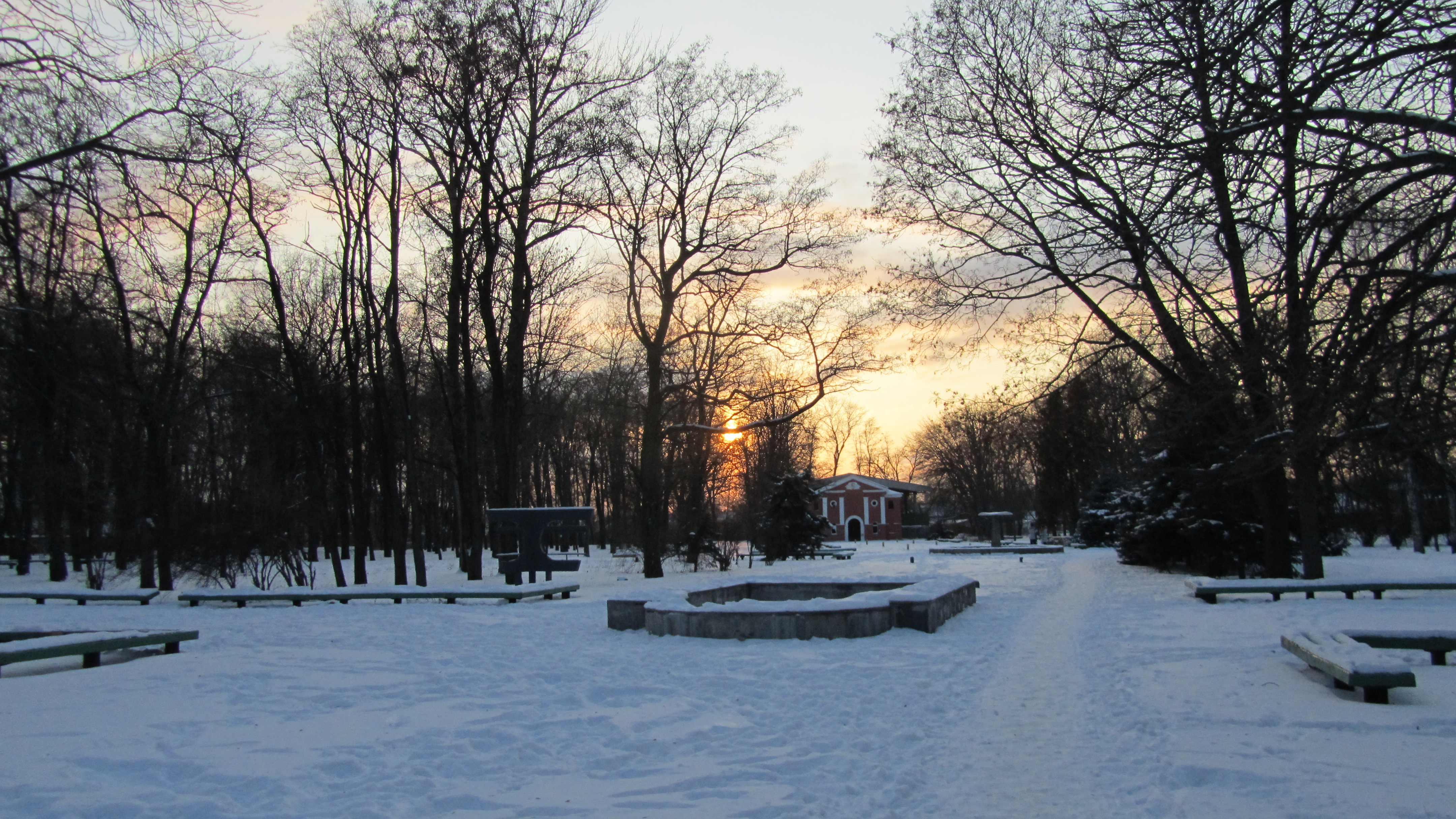 Парк Крюківського вагонобудівного заводу